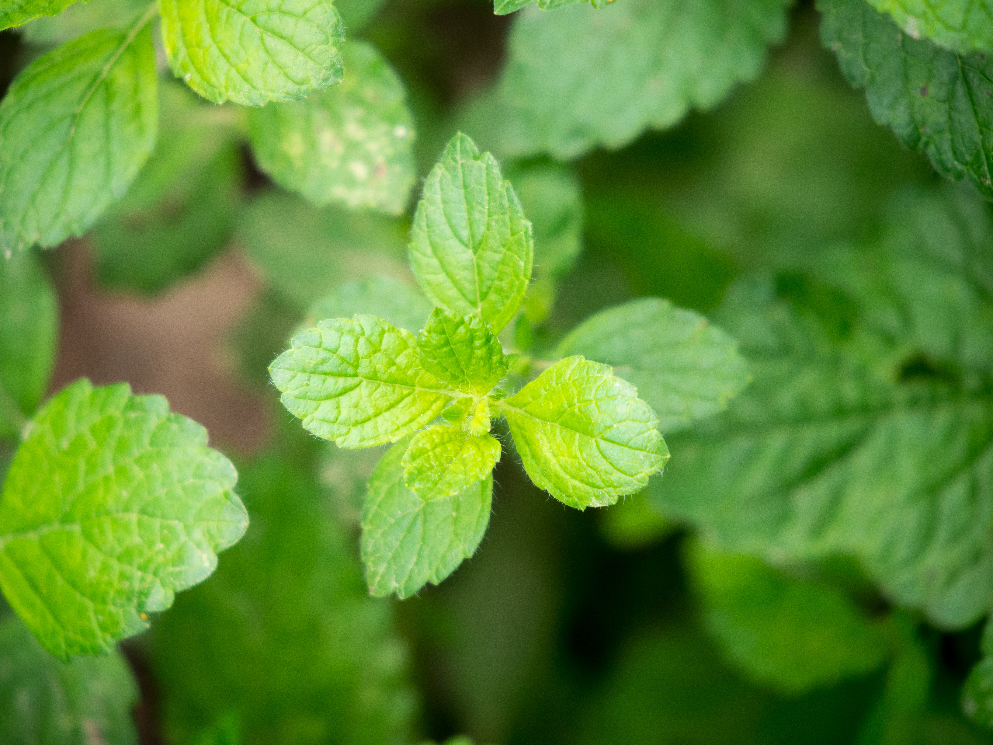 Zitronenmelisse, lat.: Melissa officinalis